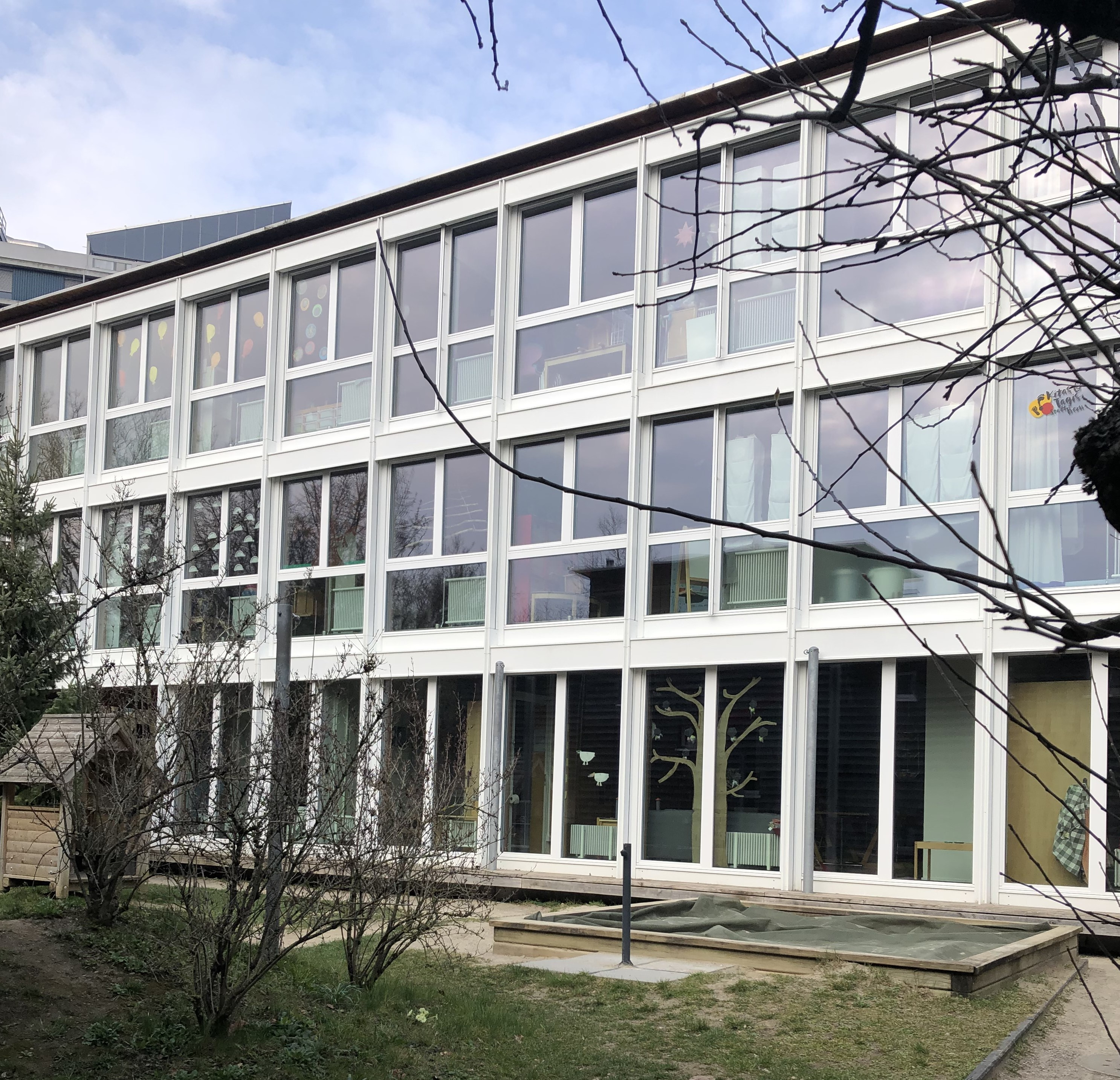 Holenacker TAGI